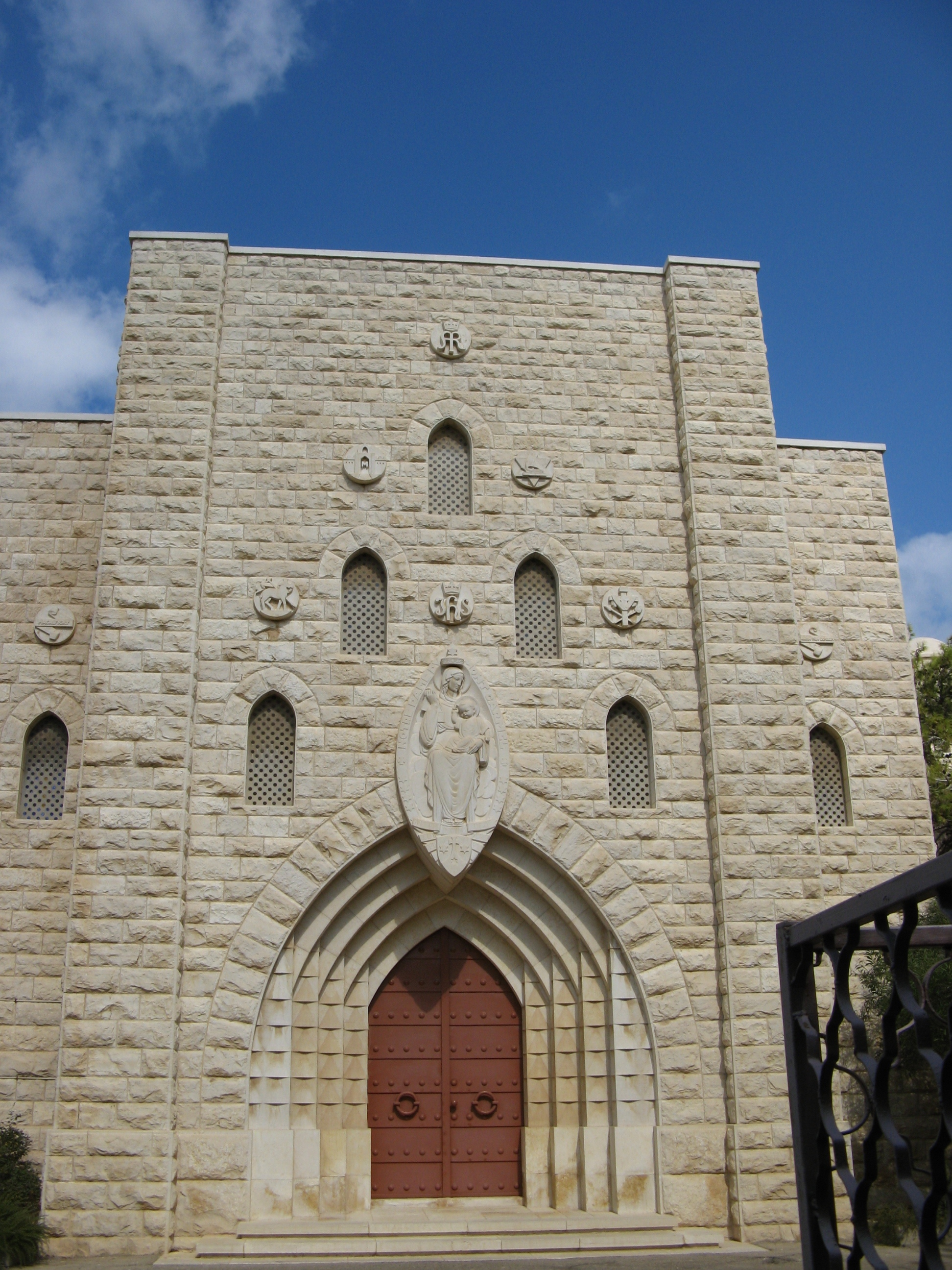 מנזר גבירתנו של הכרמל